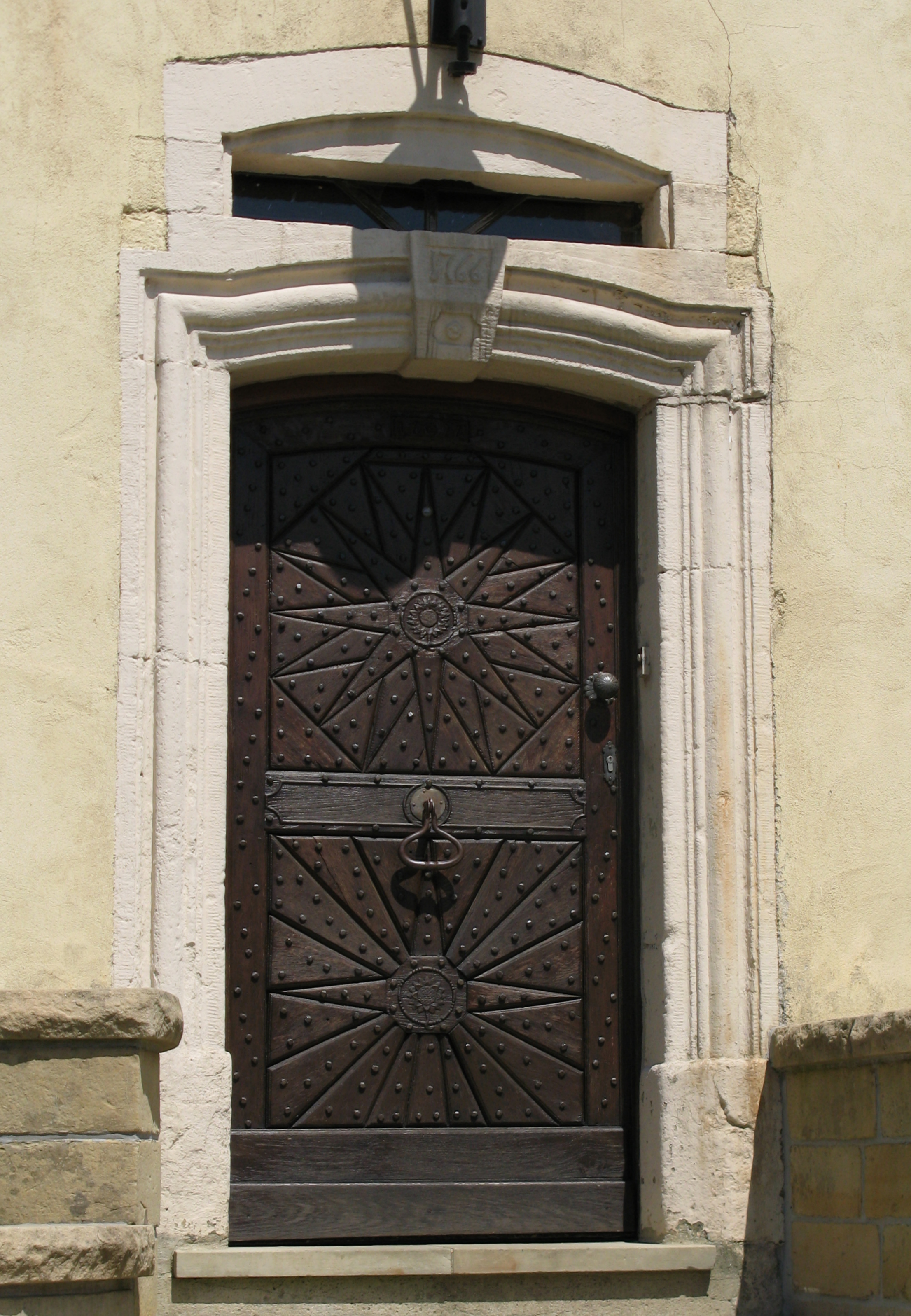 Viischt Dier vum Haff "A Gräins"